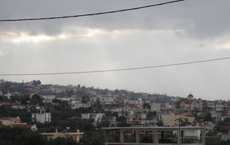 Saravali Village Greece